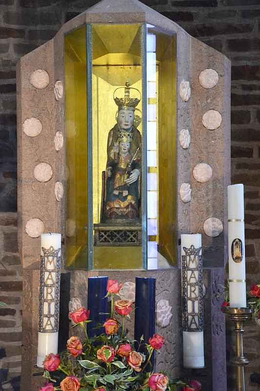 Das „Gehäuse“ für die Marienfigur bzw. die Marienstele aus dem italienischen Stein „Pepperino rosso“ mit eingelegten Blüten aus „Estramos“, 1975 entstanden, zeigt die Rosenstockornamentik und nimmt somit das Thema der „Rosa mystica“ auf.